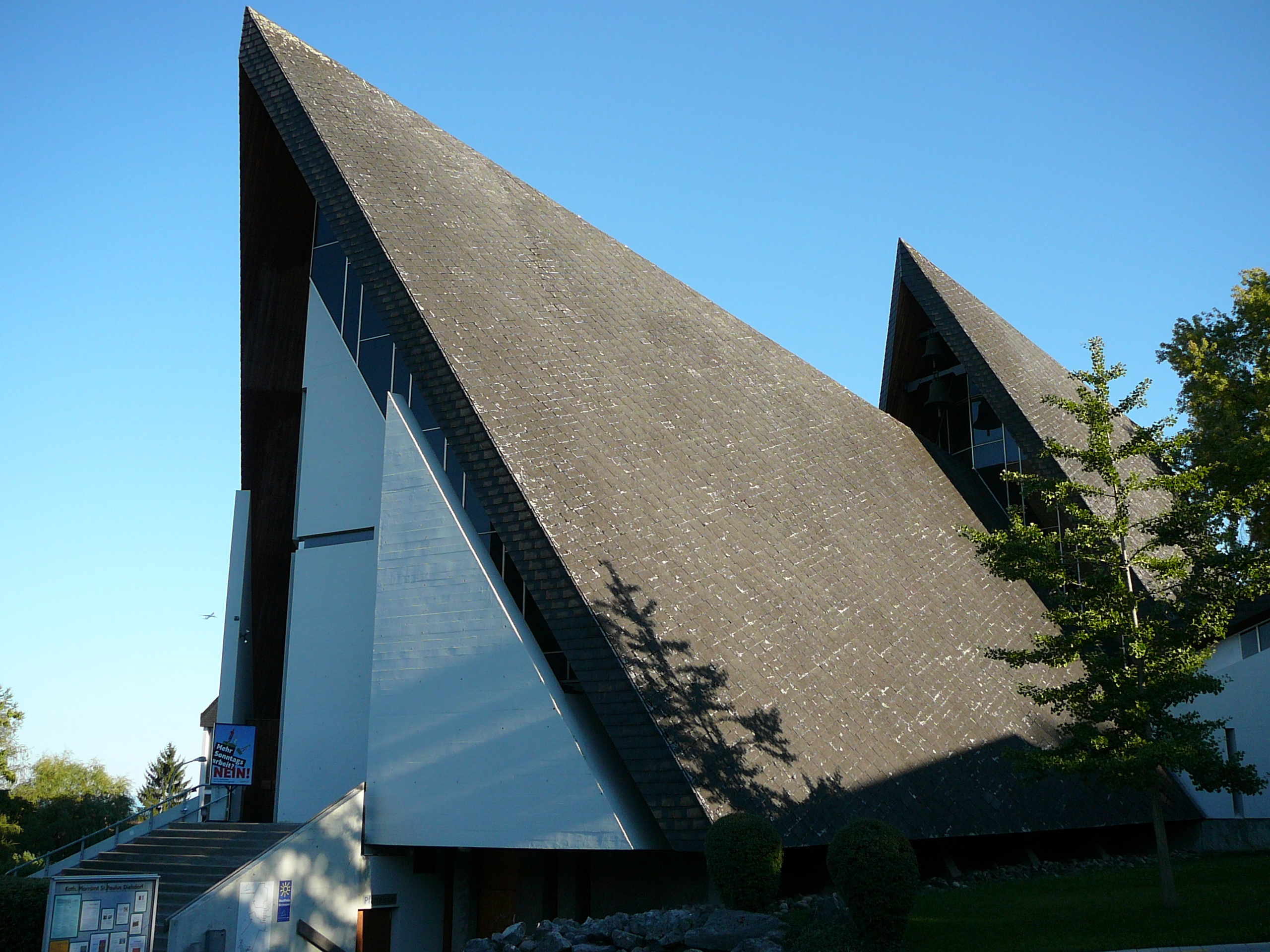 Römisch-katholische Pfarrkirche St. Paulus Dielsdorf, Dachfirste